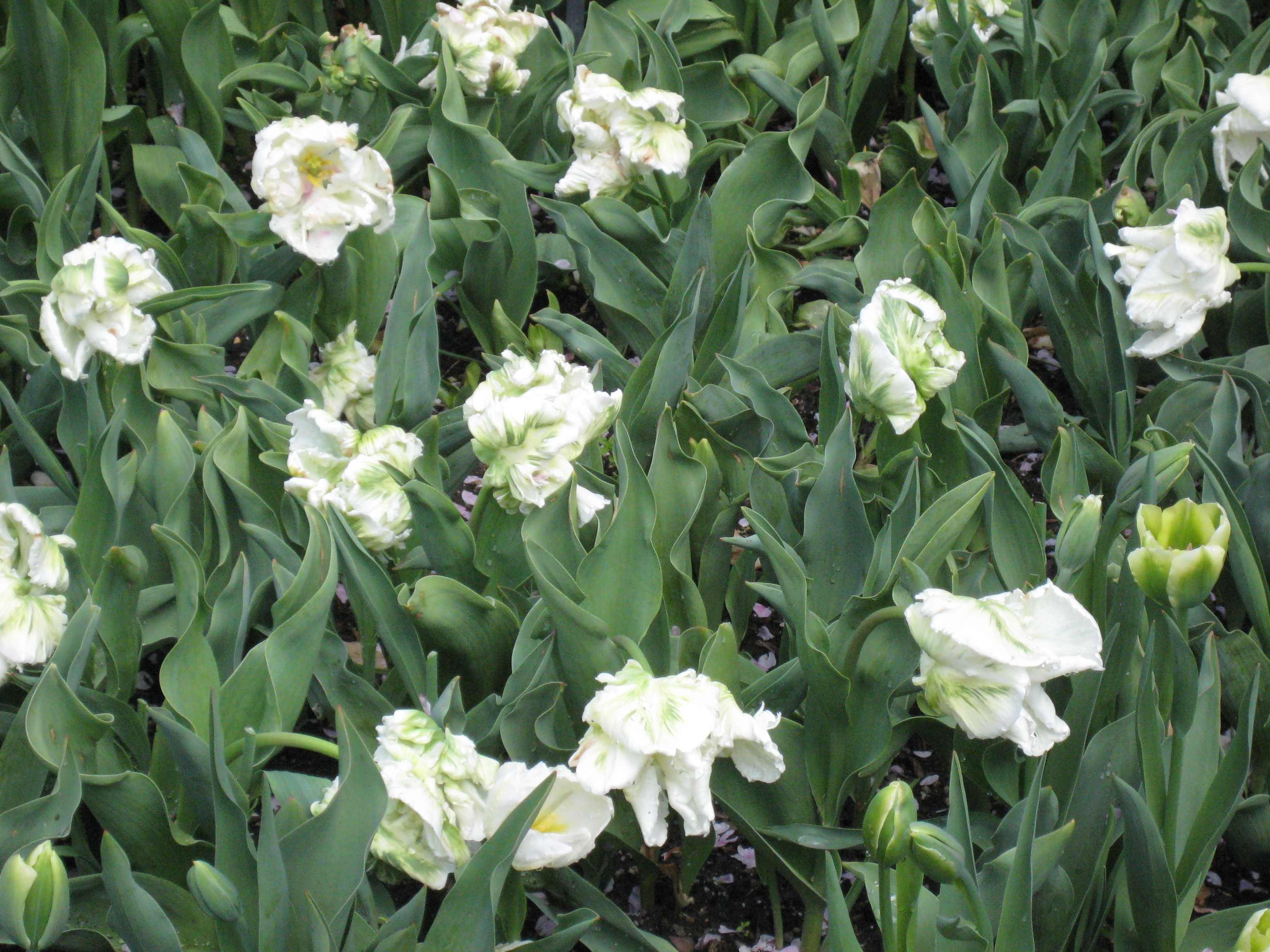 Tulipa